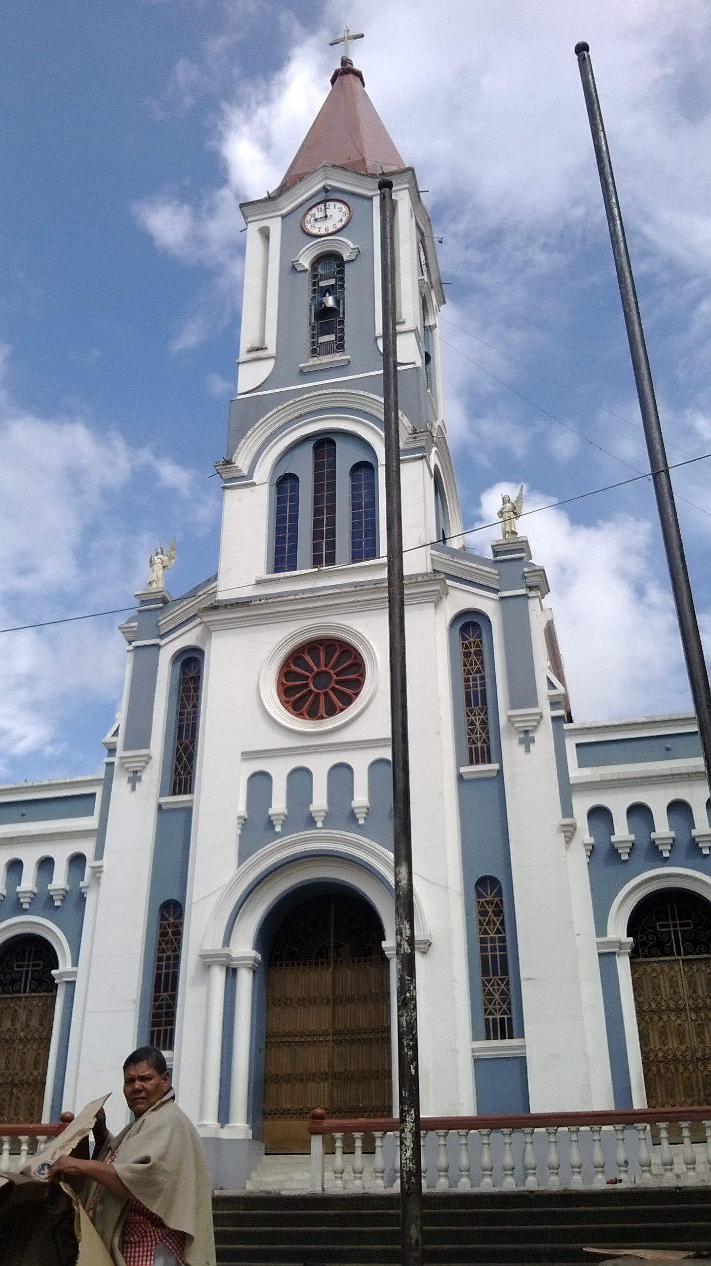 Parroquia en el centro de San Francisco de Sales